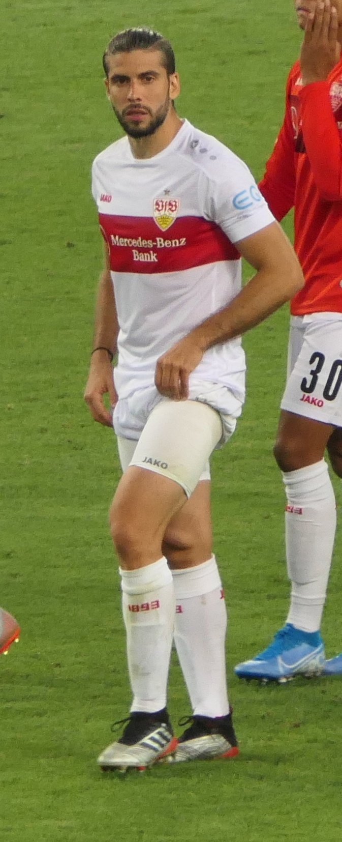 Der Fussballprofi Emiliano Insua im Trikot vom VfB Stuttgart beim Heimspiel gegen den VfL Bochum am 02.09.2019.